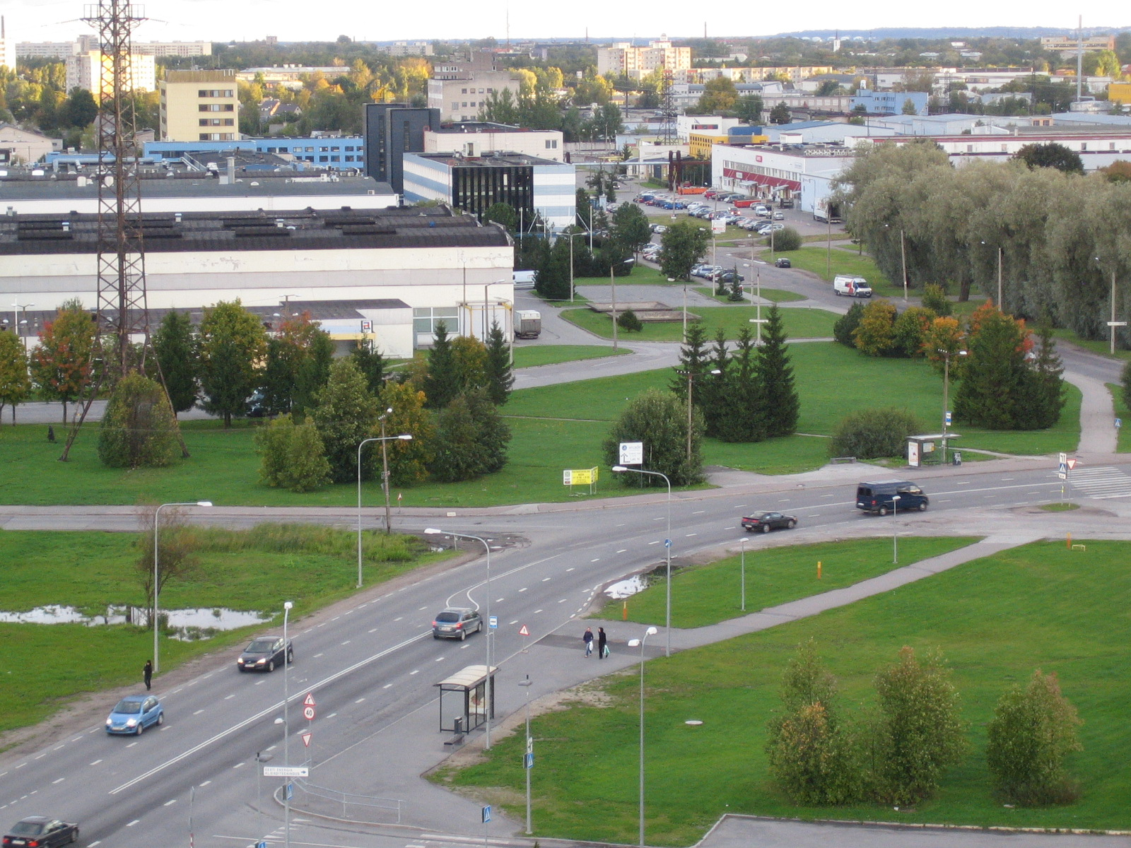 Kadaka tee Laki bussipeatuse juures.